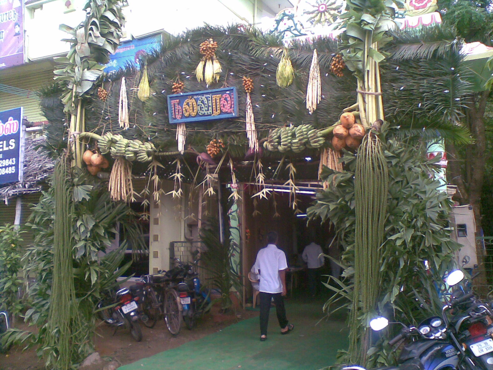 This photo depicting the ornamental gateway of a traditional Tamil marriage hall. Tamils decorating the marriage gate way by using banana, coconut and Palmyra flowers, leafs and other fruits in a natural way.